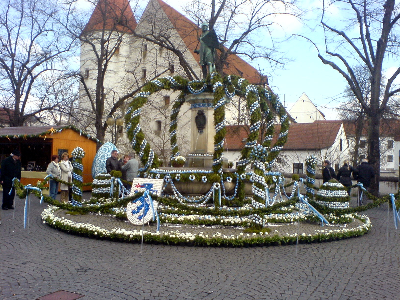 Der geschmückte Ludwigsbrunnen während des österlichen Brunnenfestes.